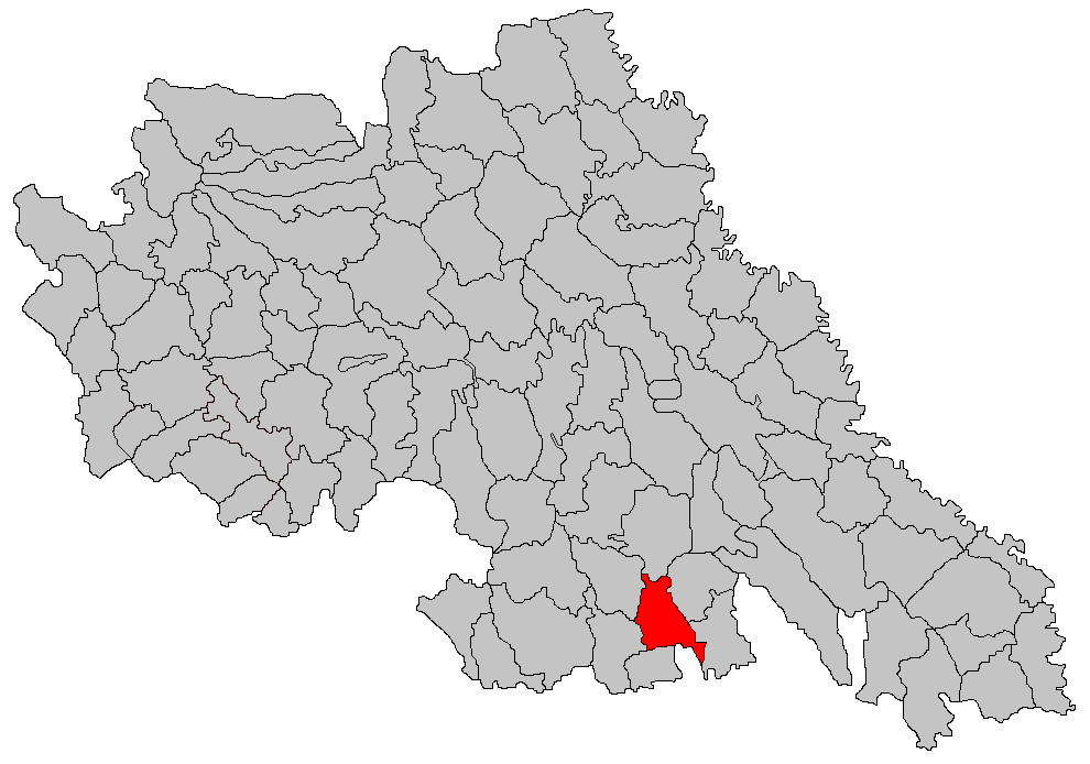 Categorie:Hărţi ale judeţului Iaşi